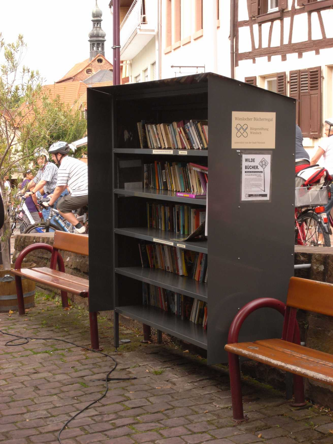 öffentliches Bücherregal in der Stadt Wiesloch